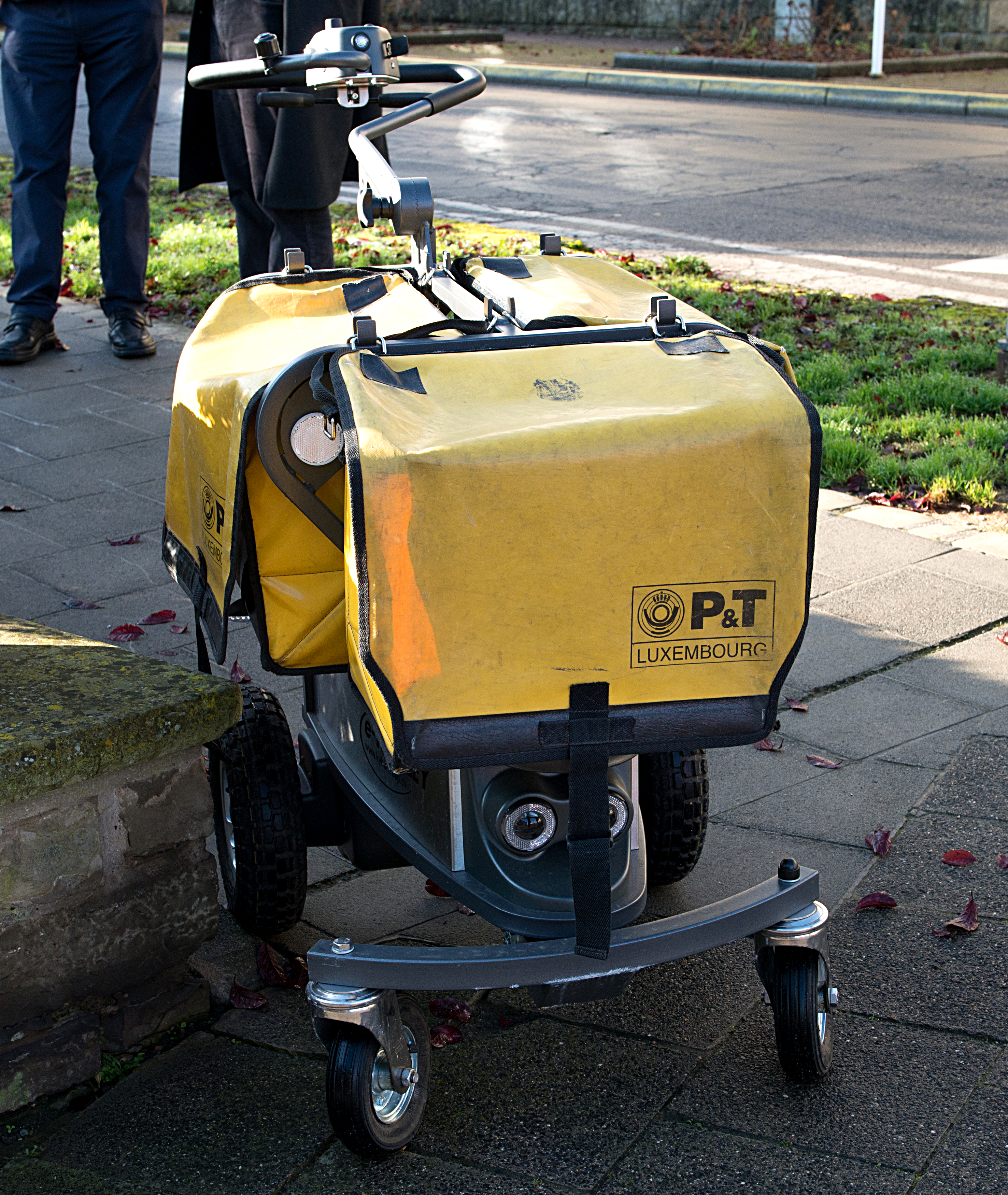 Postweenchen zu Déifferdeng.